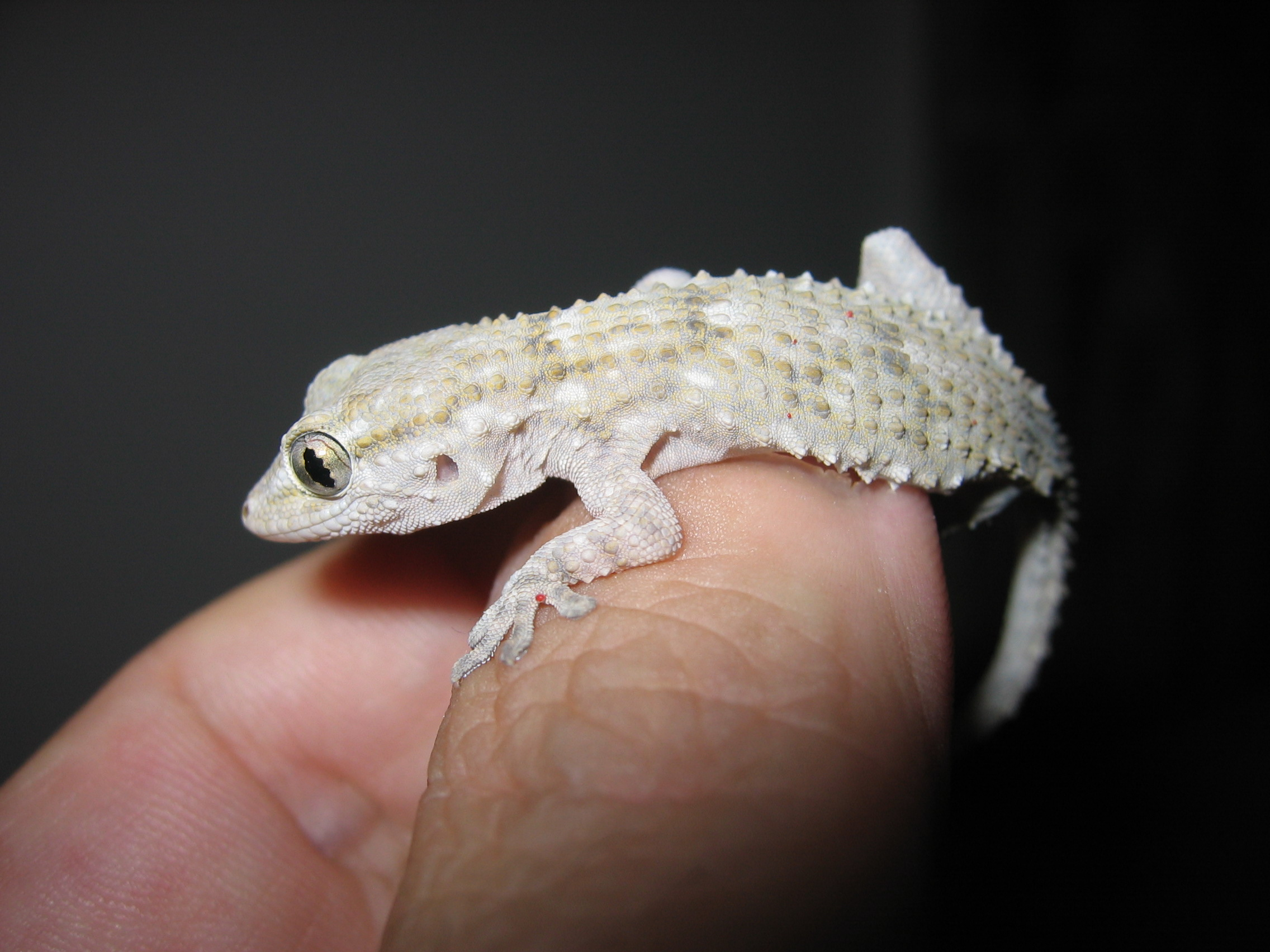 geco trovato in giardino - Gekko found in garden